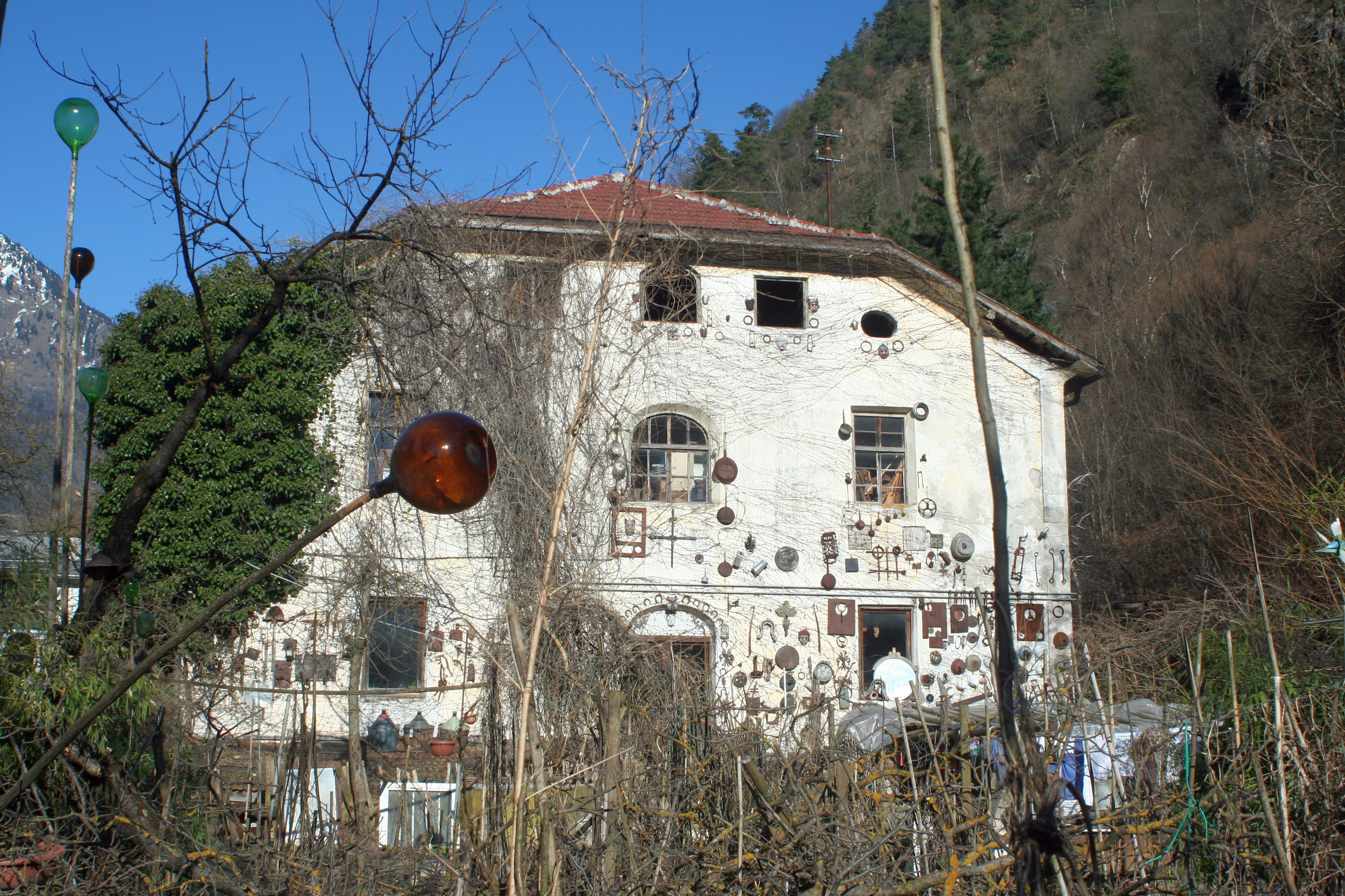 Bad Egart